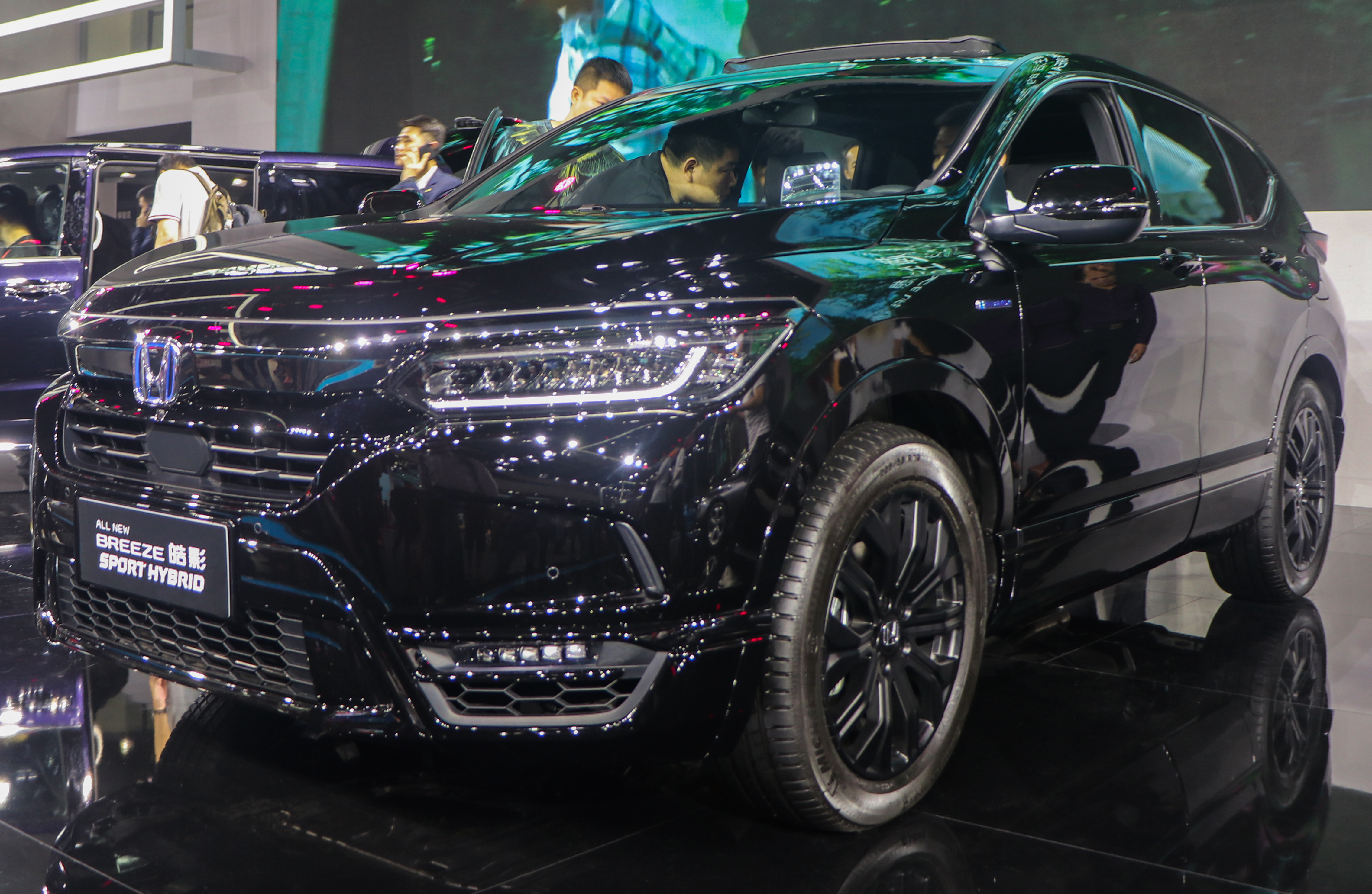 广汽本田皓影锐混动于2019年广州车展